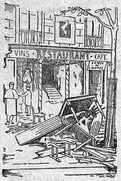 Le restaurant Very - extérieur